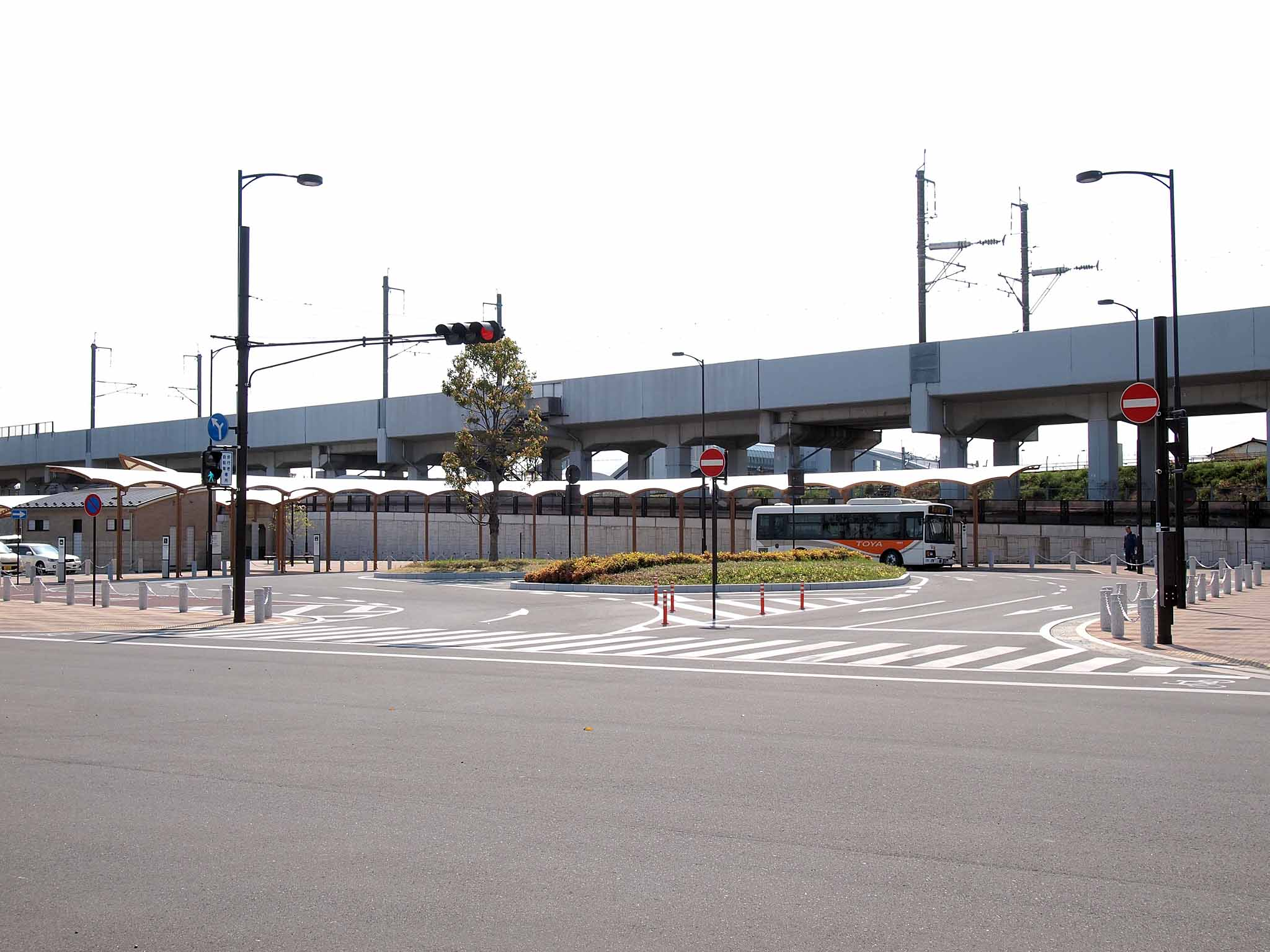 2011年の橋上駅舎化にあわせて開設されたJR雀宮駅東口。東北新幹線を地下で横断している。2014年からは土日祝日にインターパークを経由して真岡市までの路線バスが開設された。